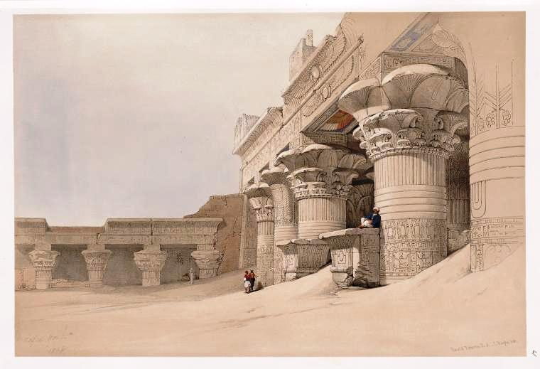 ציור של מקדש אדפו חזית אולם ההיפוסטיל הגדול. צייור של דייויד רוברטס